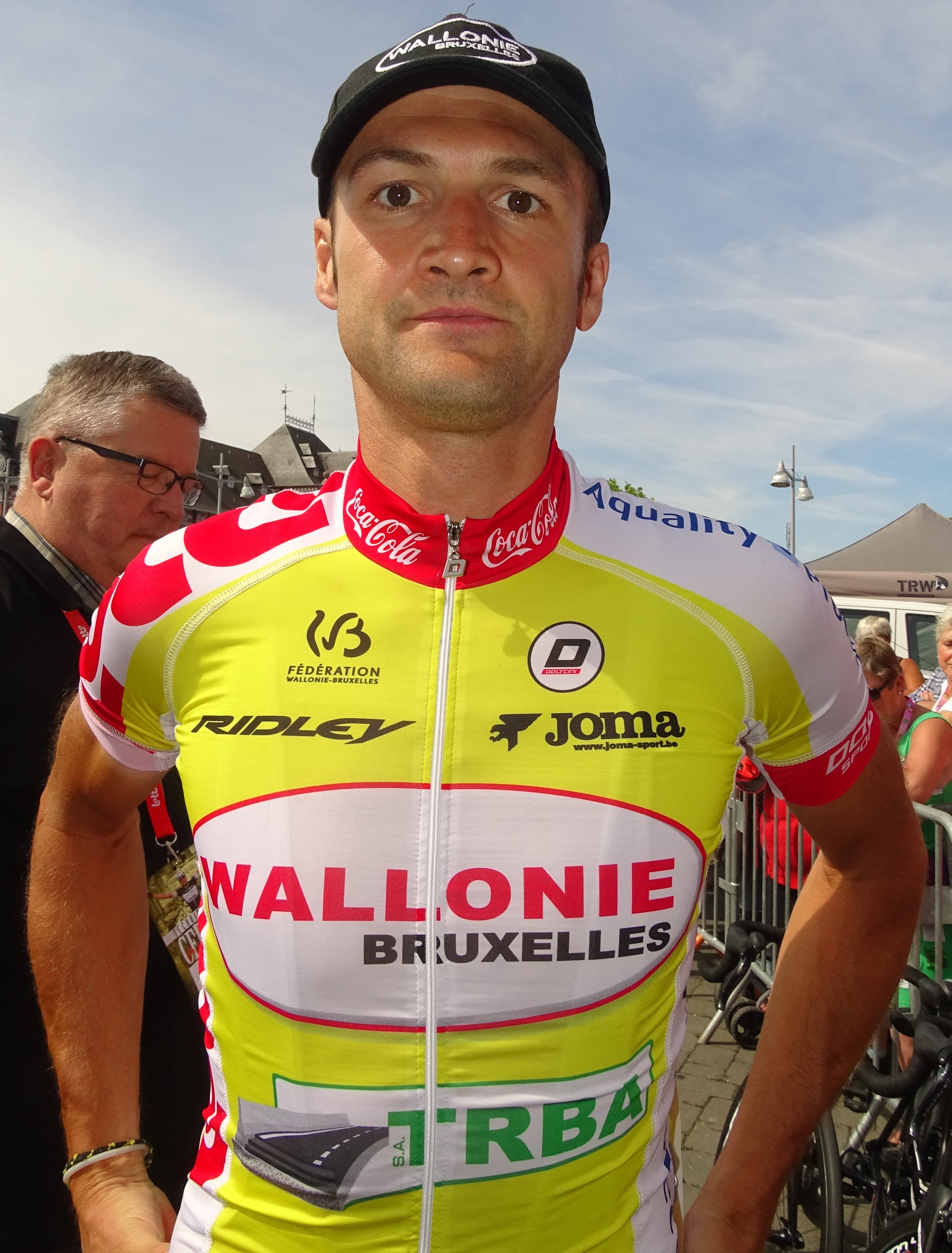 Reportage réalisé le mercredi 22 juillet à l'occasion du départ du Grand Prix Pino Cerami 2015 à Saint-Ghislain, Belgique.